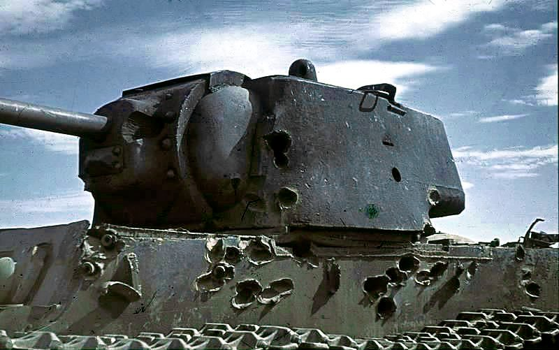 Bilder nach der Panzer-Schlacht vor Stalingrad im August 1942 in der Steppe vor der Stadt